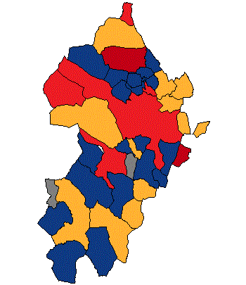 !Template:Llegenda}